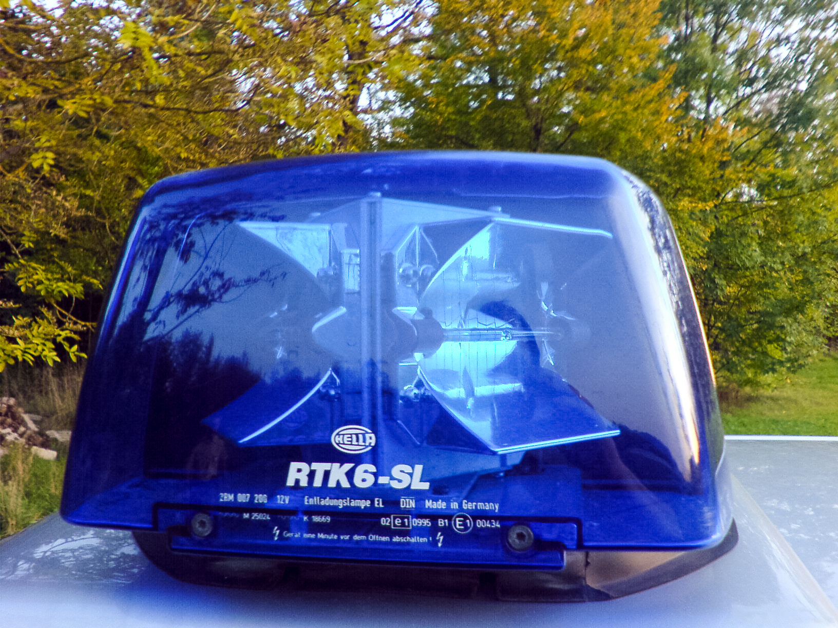 Doppelblitzleuchte mit Rinnenparabolblitz und blauem Glaskörper Fabrikat: Hella RTK 6-SL